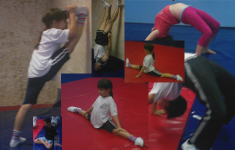 תרגילי בסיס של וו שו מודרני